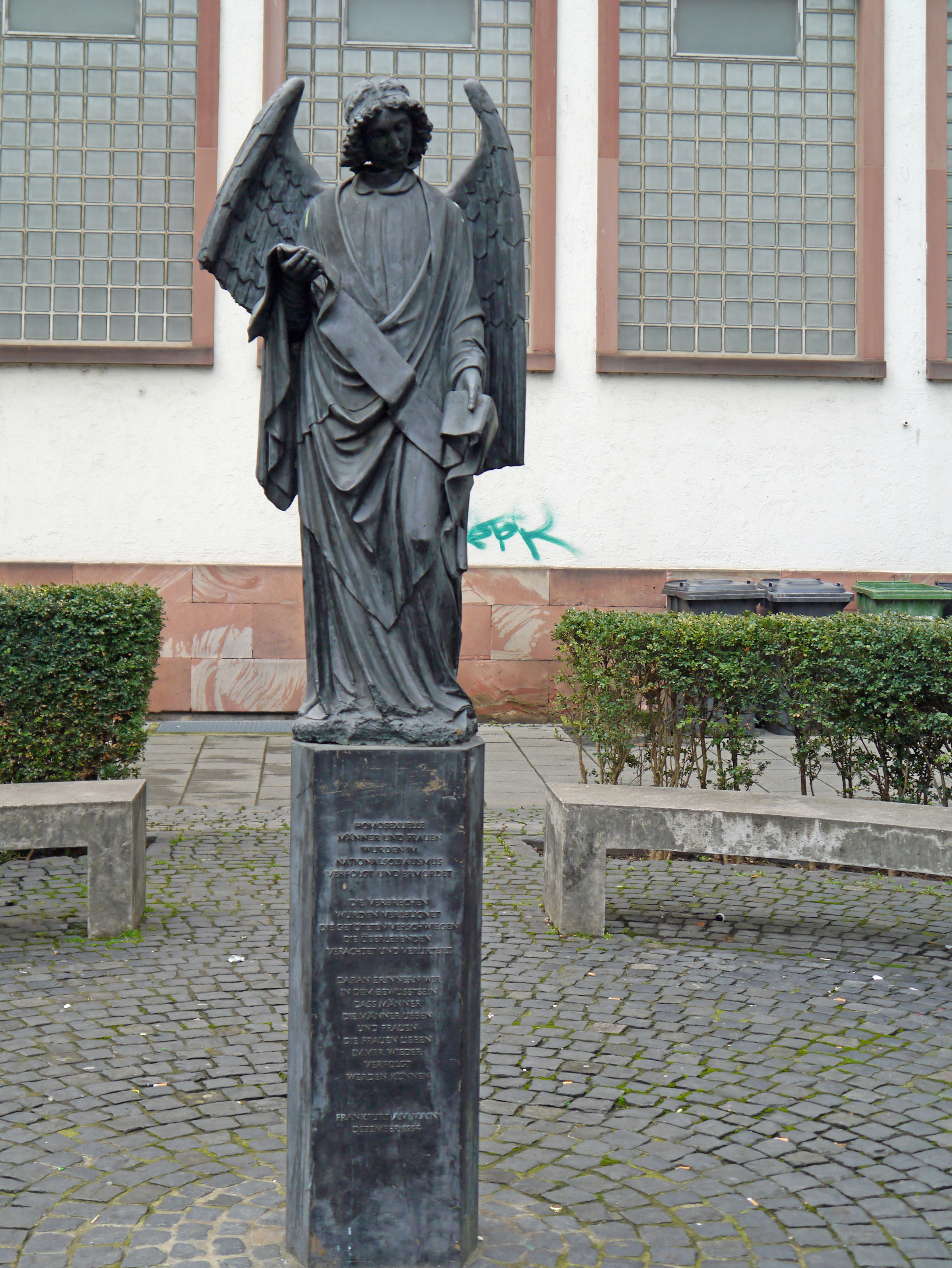 Der Frankfurter Engel, das Mahnmal zur Homosexuellenverfolgung in der Nazizeit, auf dem Klaus-Mann-Platz in Ffm-Innenstadt.